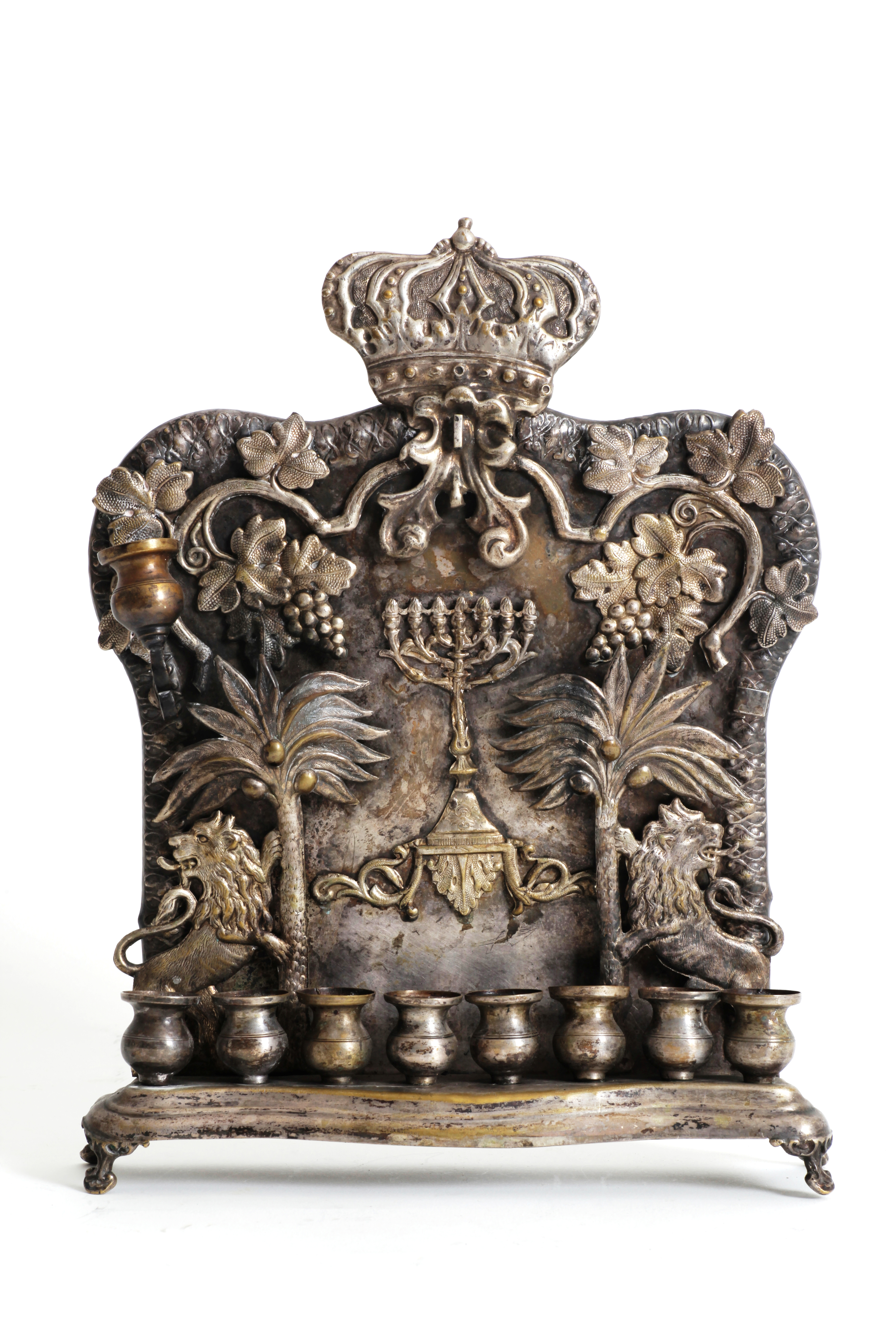 חנוכיית גן-עדן